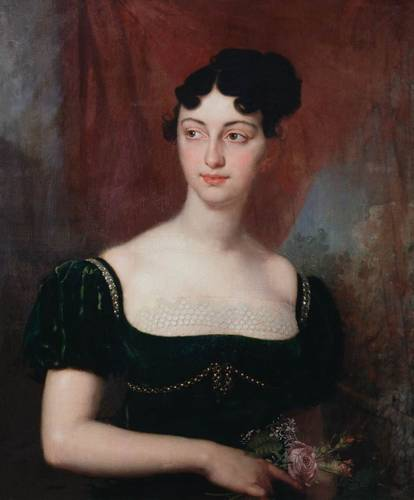 Мария Николаевна Яковлева (1796 -?), впоследствии жена генерал-майора Карла Георга Августа фон Бистрома, павшего во время Русско-Турецкой войны. Правнучка промышленника-миллионера С.Я. Яковлева; дочь Н.М. Яковлева (1761-1813) и грузинки из княжеского рода Дарьи Семеновны Баратовой. Холст, масло. 79х65. Ж-576 Слева внизу: Писалъ В. Боровиковскiй Пост. в 1996 из Государственного музейно-выставочного центра "РОСИЗО"/ Ростовский кремль